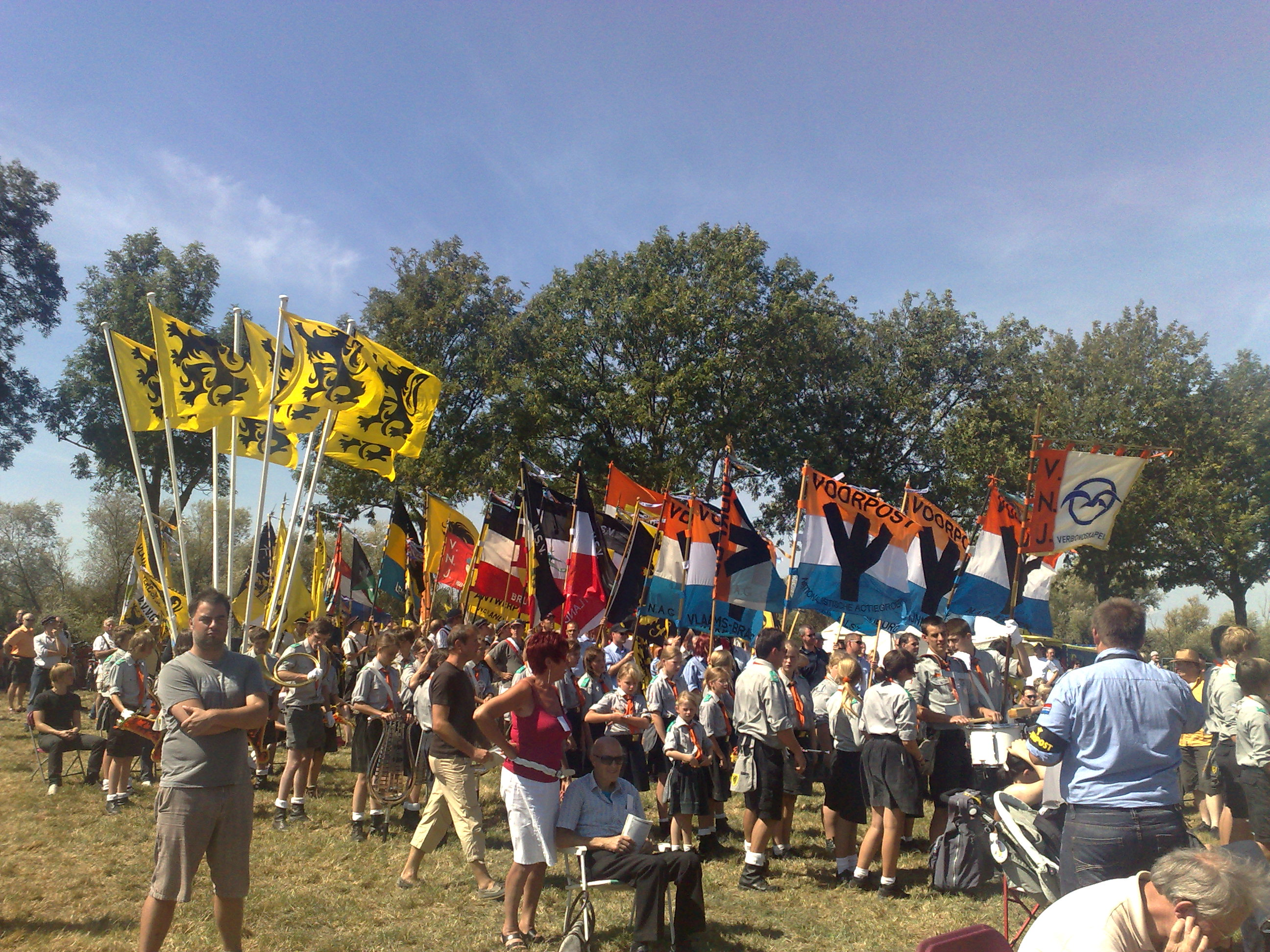 Vlaggenoptocht IJzerwake 2009, eigen werk.